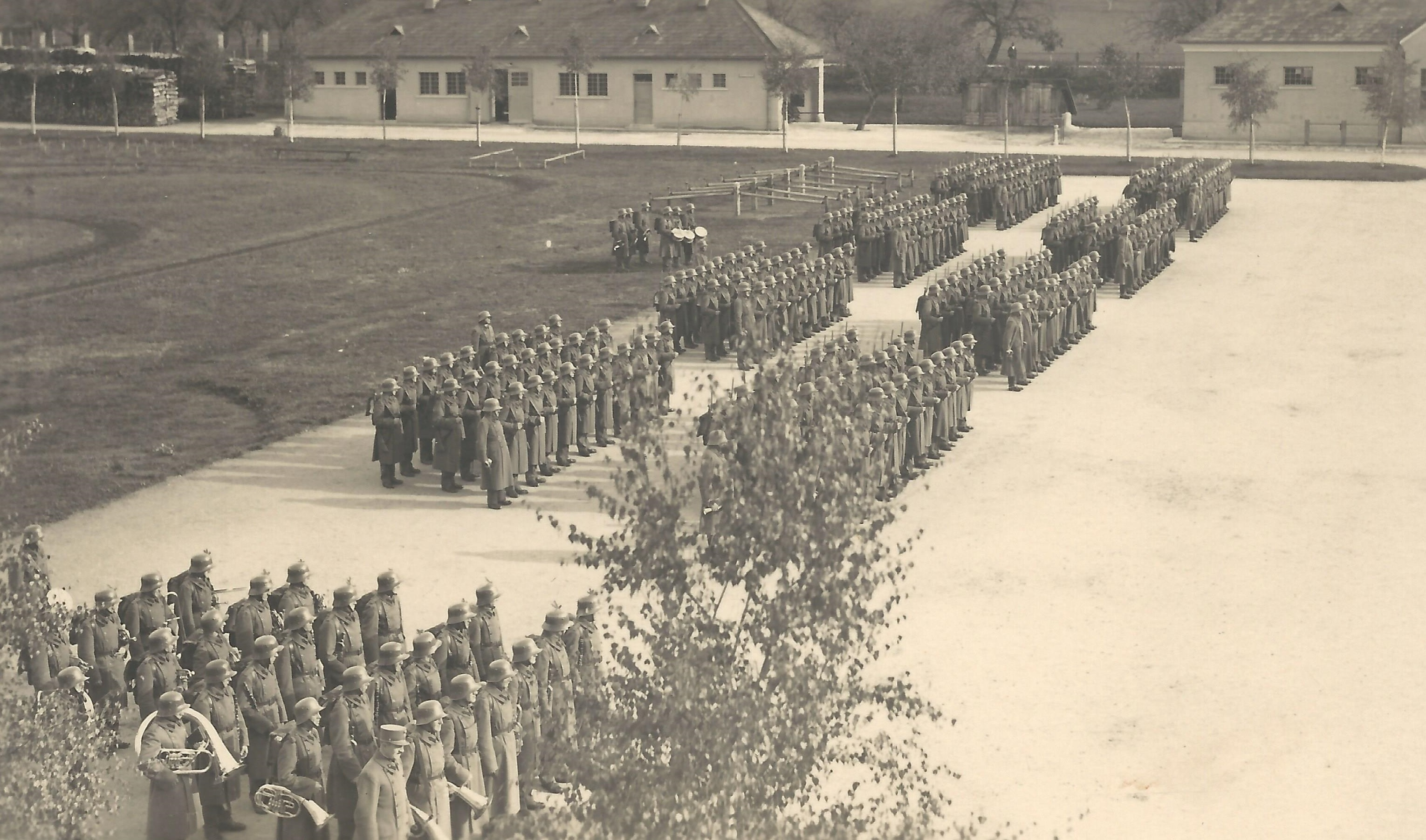 Feldjägerbataillon 2 bei einer Parade in der Kaserne Pinkafeld. Die Aufnahme entstand entweder 1936 oder 1937. Genauere Details werden von lokalen Historikern momentan abgeklärt.